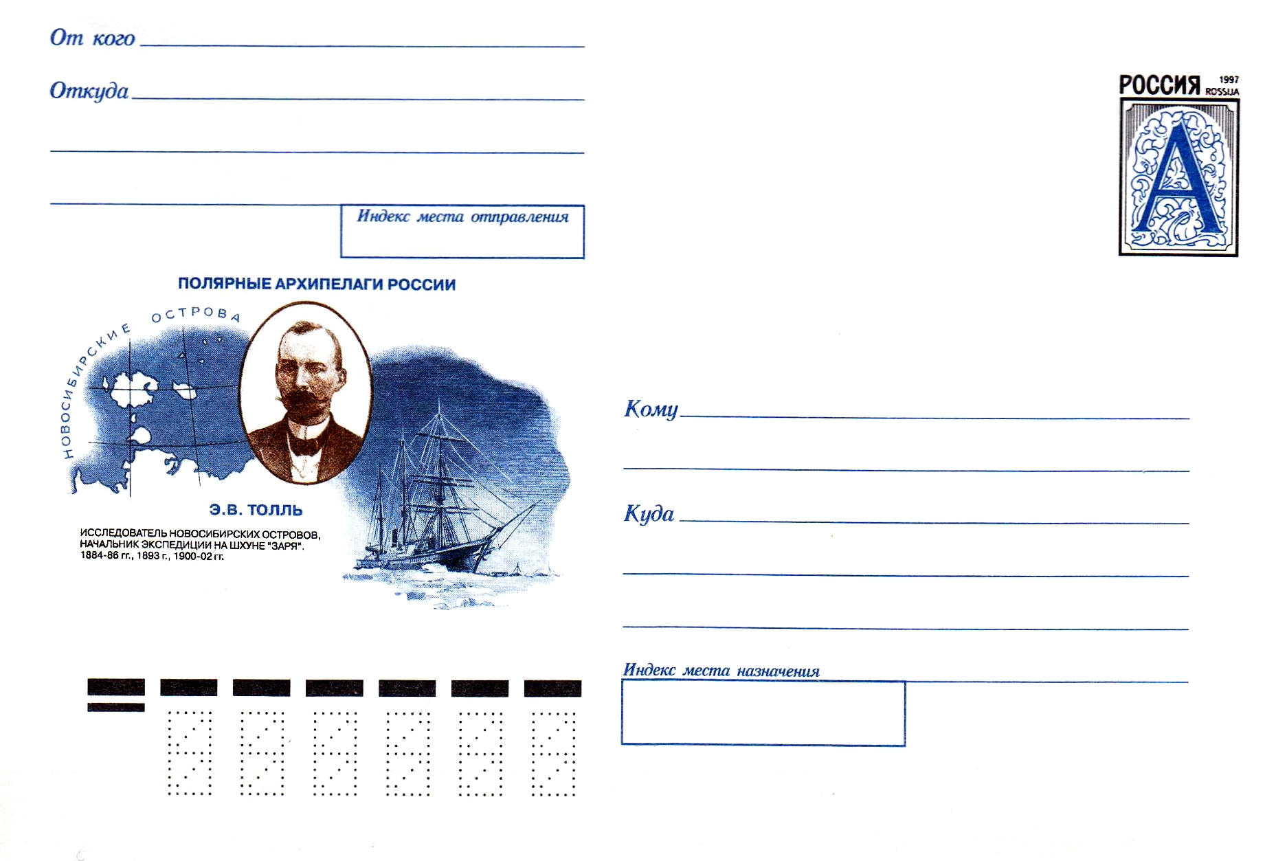 1998.04.10-01 Полярные архипелаги России. Новосибирские острова. Э.В. Толль исследователь Новосибирских островов, начальник экспедиции на шхуне "Заря". 1884-86 гг., 1893 г., 1900-02 гг.